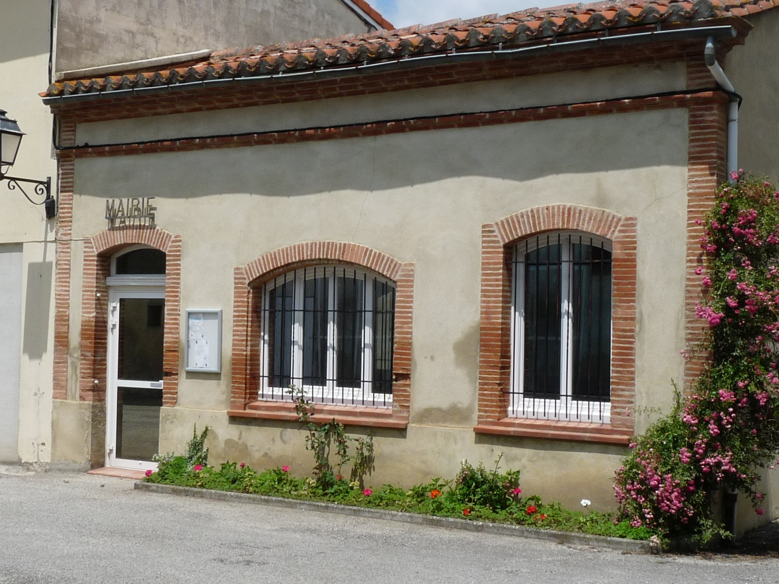 Mairie de Toutens, Haute-Garonne, France